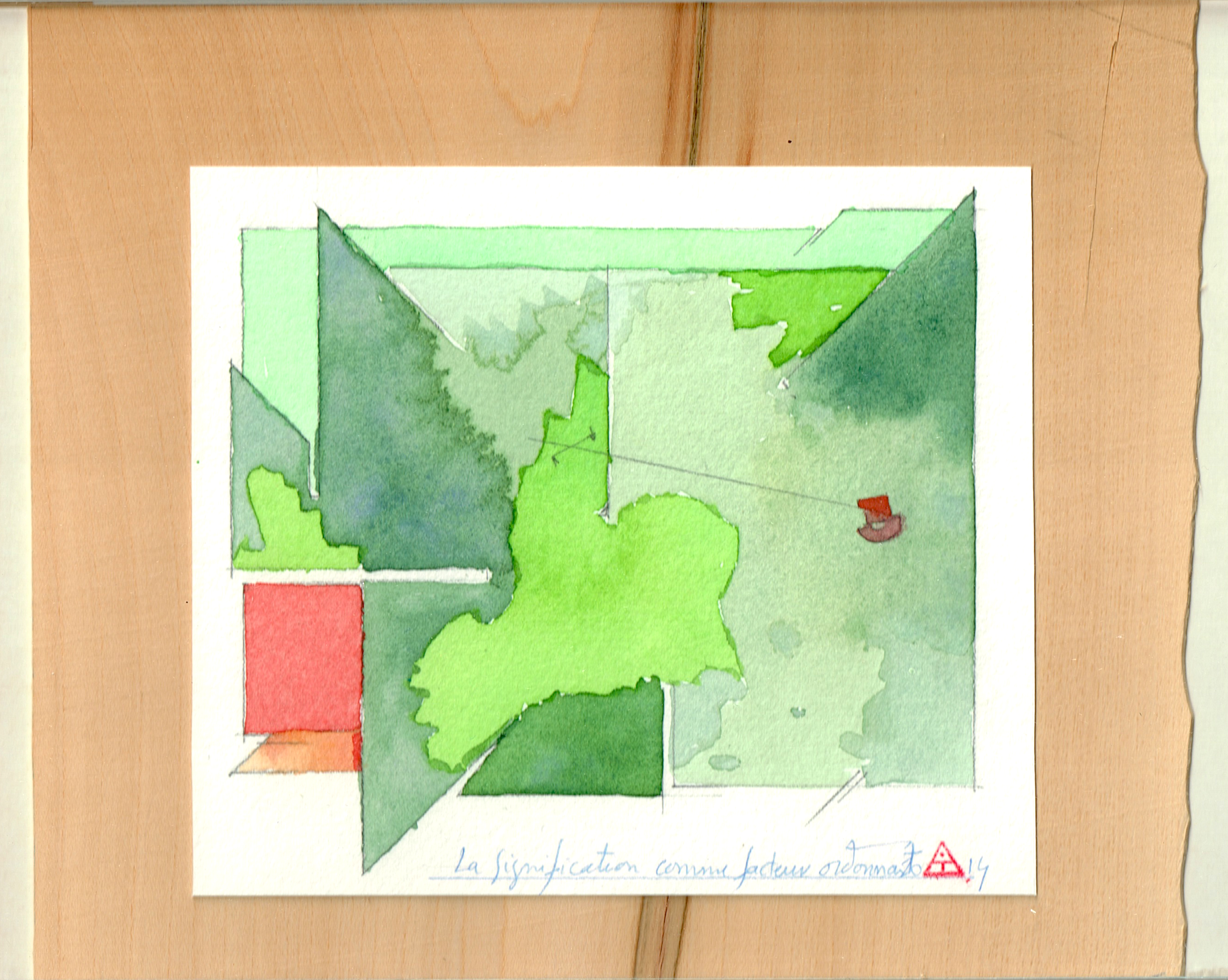 Aquarelle 14 x 11 cm